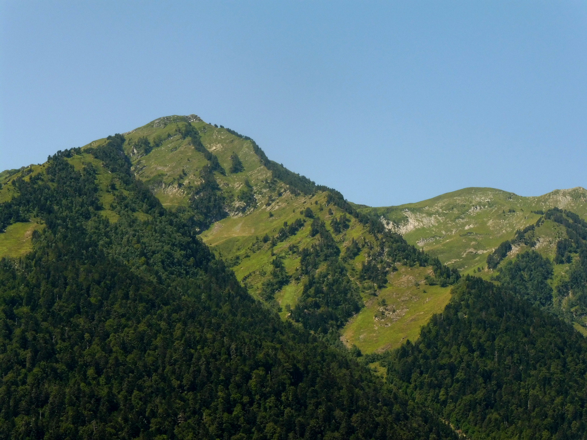 Era Entecada des de la Roca de Sèrra (Vall d'Aran) This is a a photo of a natural area in Catalonia, Spain, with id: ES510088